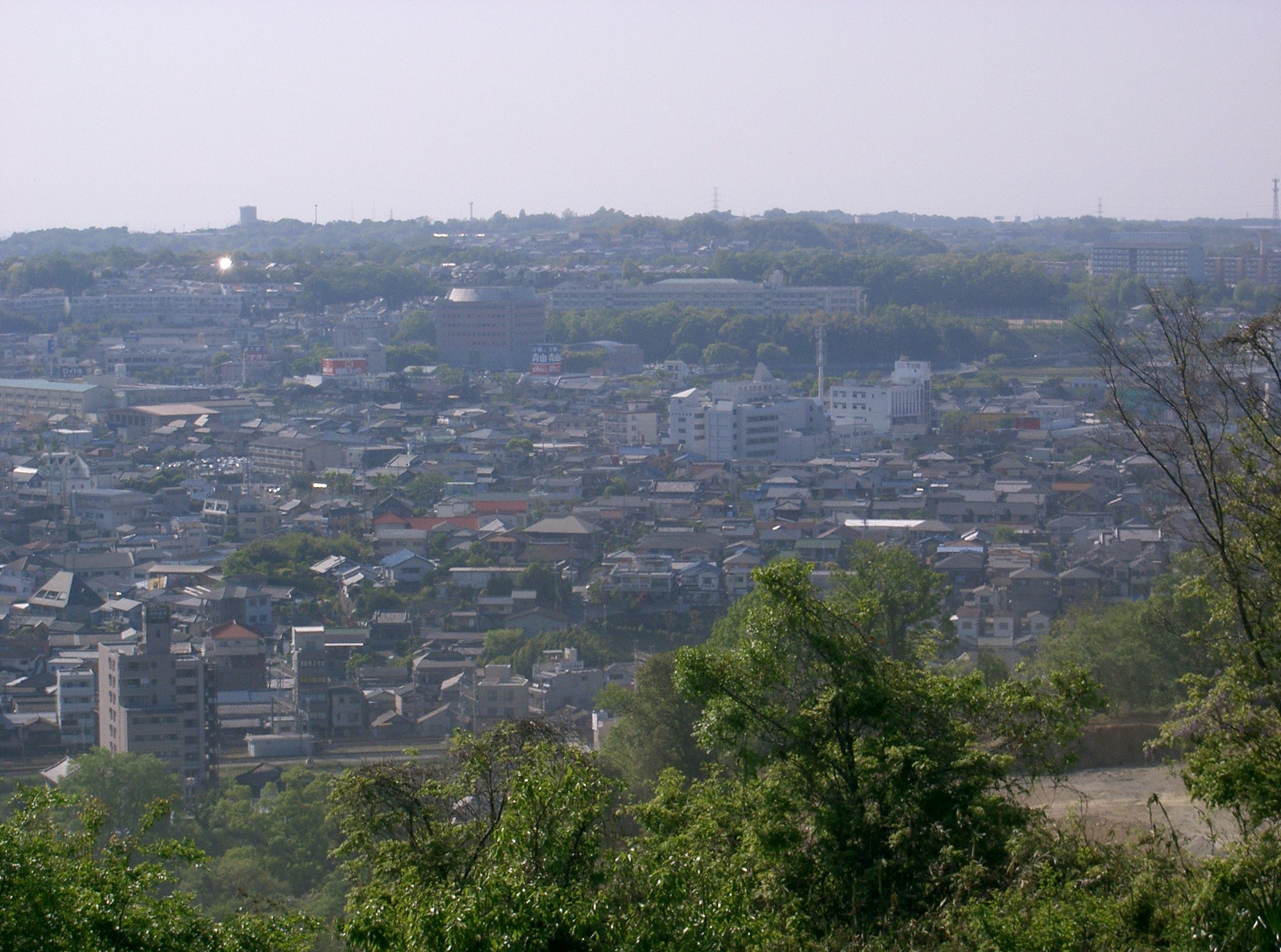 長野公園・河合寺地区